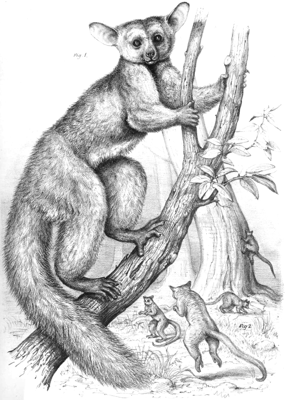 Galago crassicaudatus = Otolemur crassicaudatus